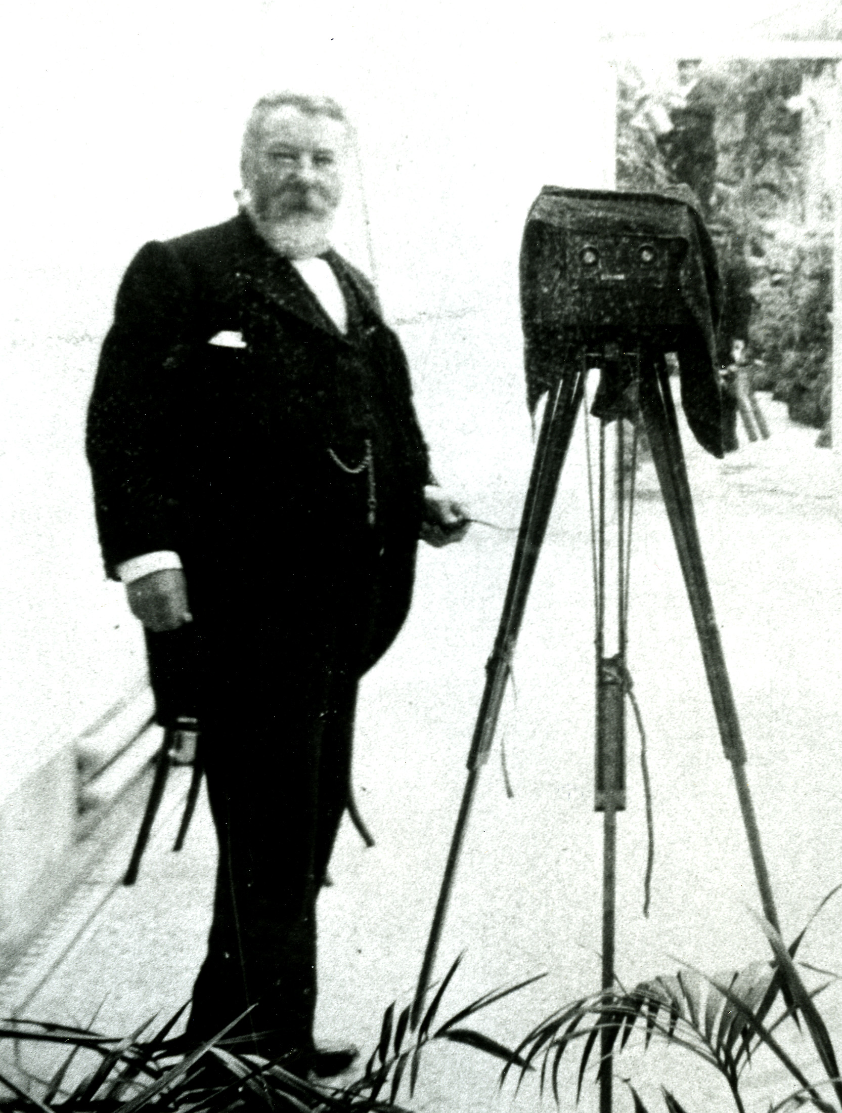 Alfred Seaman, detail stereoskopického autoportrétu, asi 1901